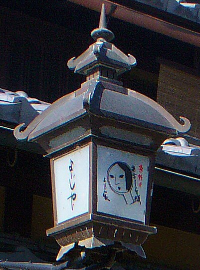 京都市産寧坂にある「よーじや 清水産寧坂店」の看板。